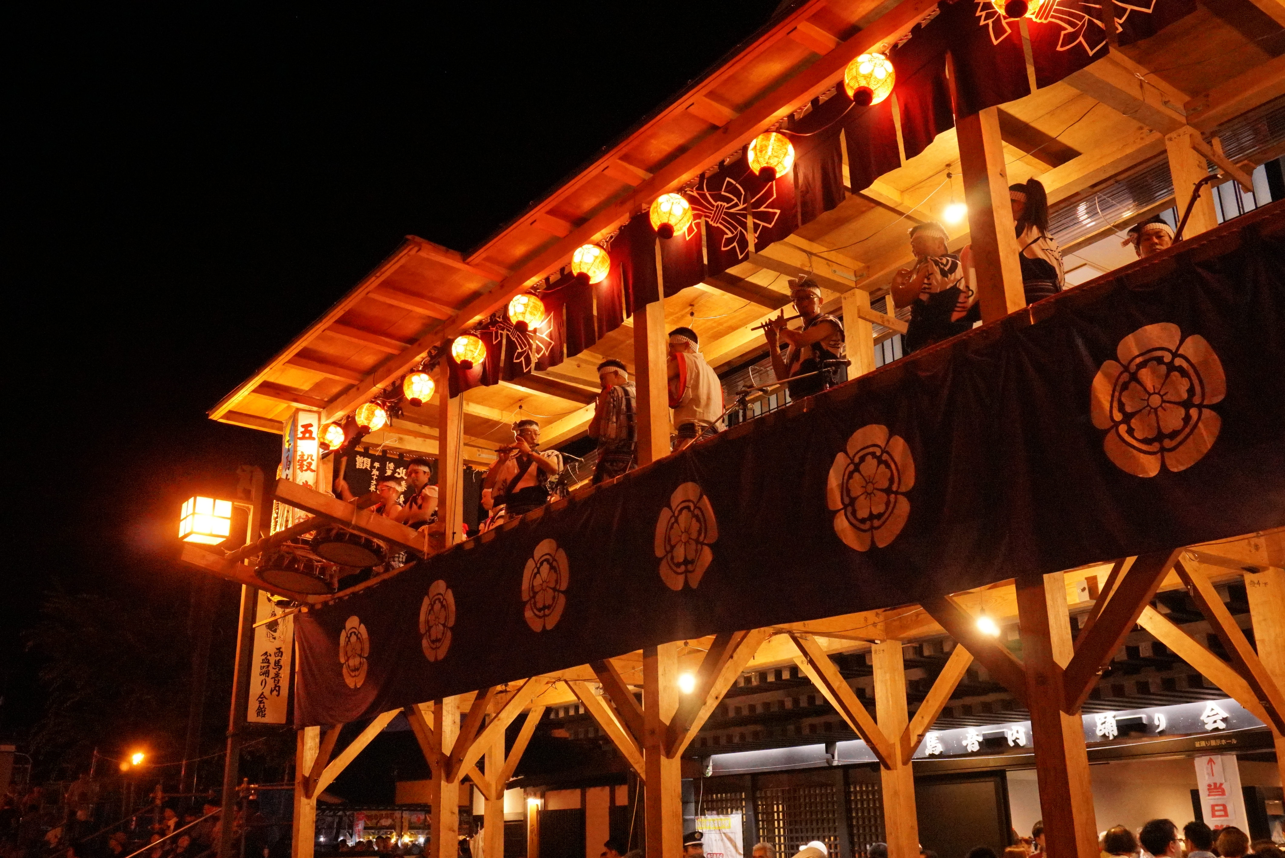 日本三大盆踊りの一つ、西馬音内の盆踊（秋田県羽後町）